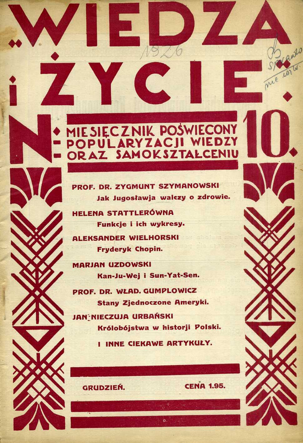 Okładka miesięcznika Wiedza i Życie z grudnia 1926 roku, rok I, zeszyt 10.